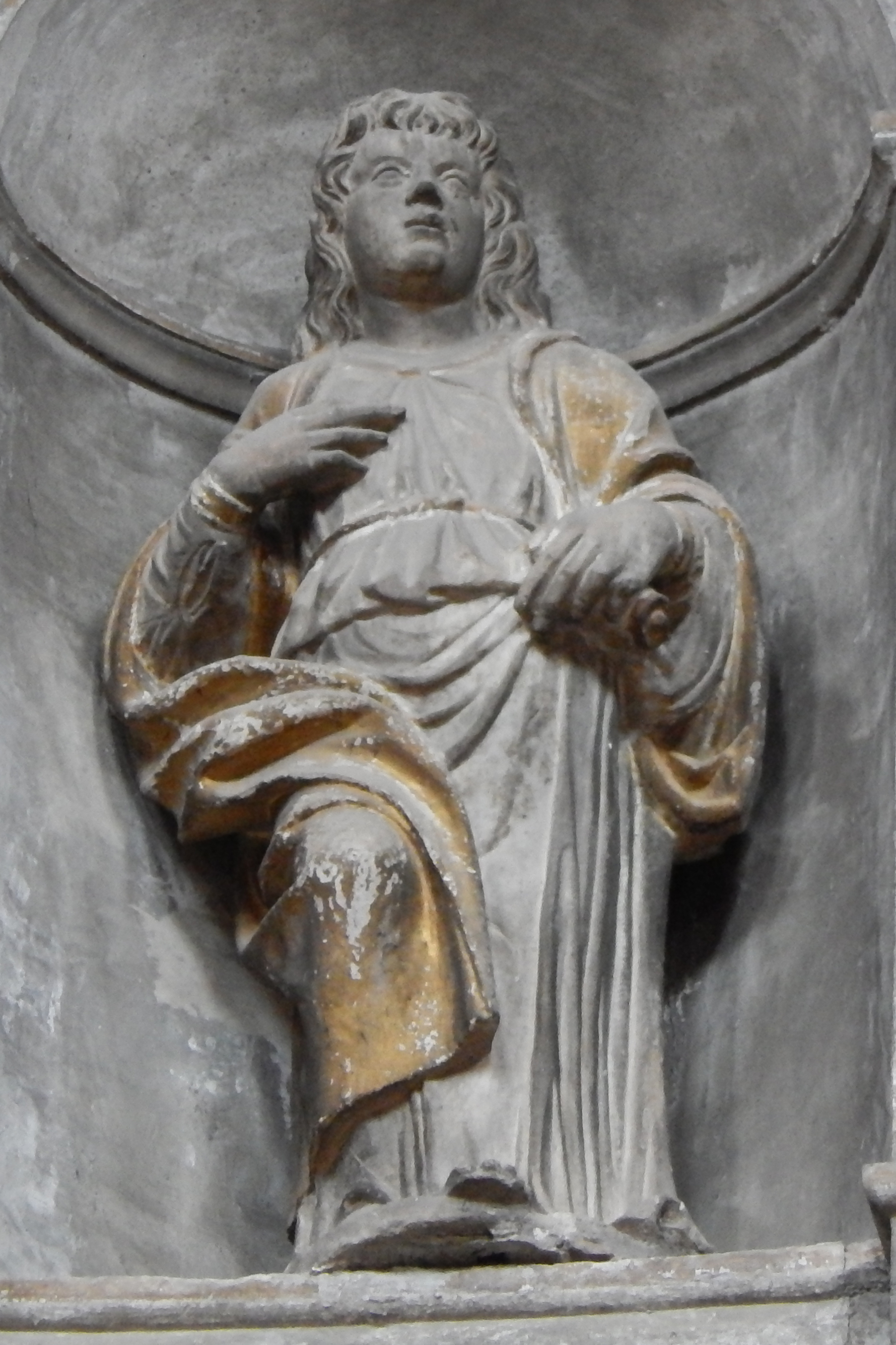 Santo, 1489, Gasparo Cairano, chiesa di Santa Maria dei Miracoli, Brescia